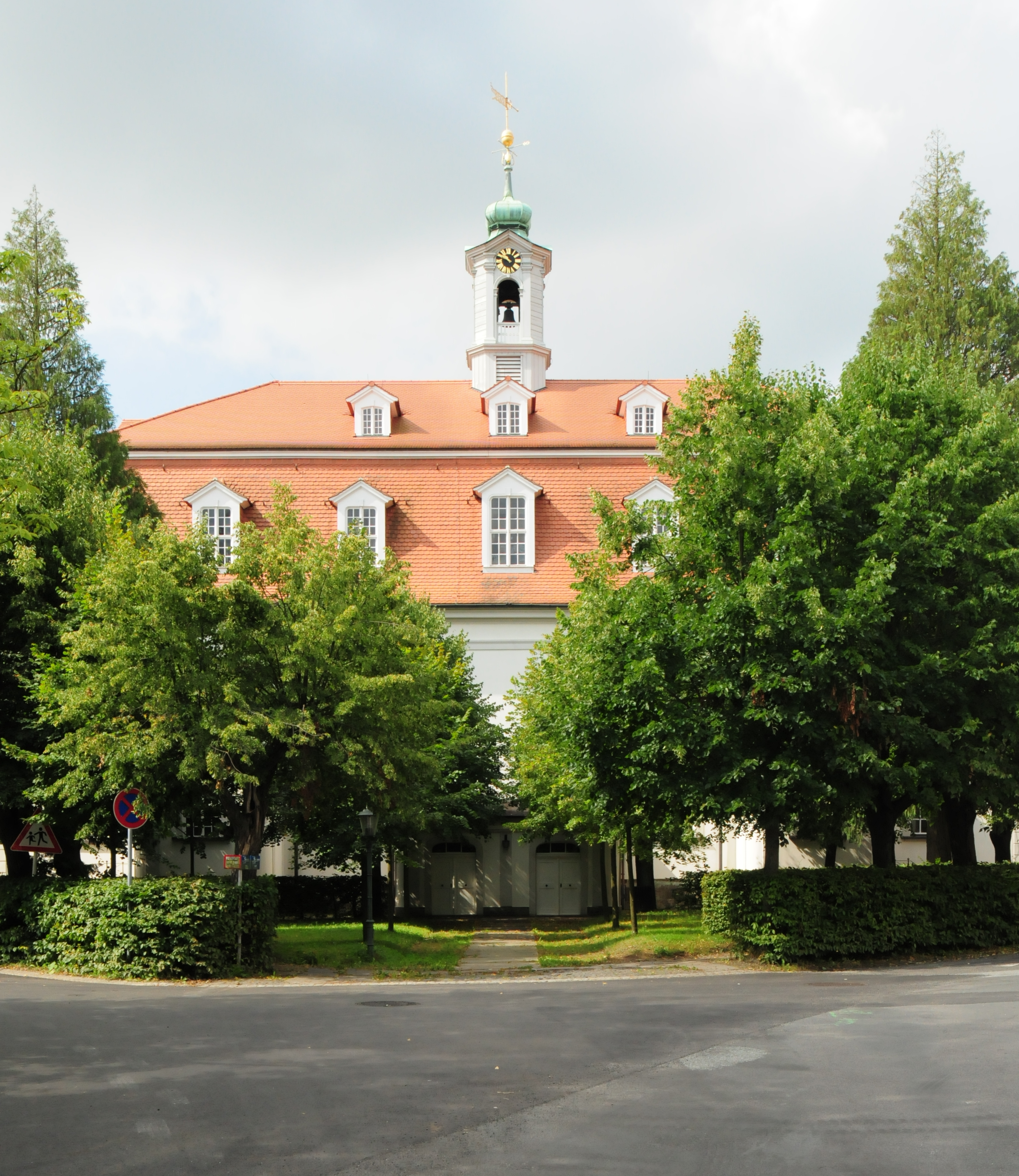 Herrnhut, Gemeinsaal, Comeniusstrasse (Landkreis Görlitz, Sachsen, Deutschland)